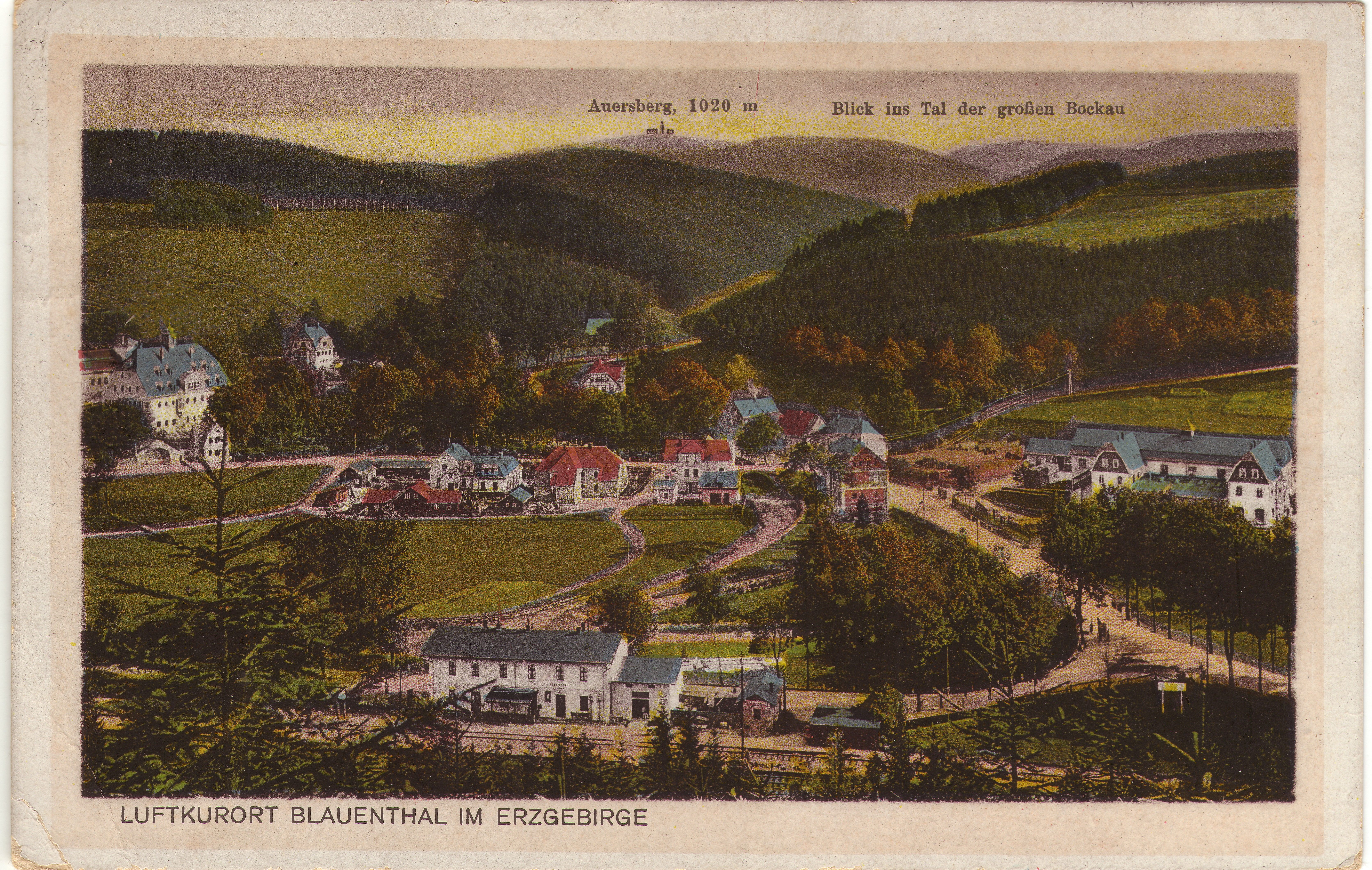 Blauenthal: Ansichtskarte aus den 1910er oder 1920er Jahren. Blick in südliche Richtung. Das Foto wurde von den Südhängen des Hahnberges (622 Meter), möglicherweise vom Schulze-Stein aus aufgenommen. Im nördlichen Teil dieses Bergmassivs liegt Burkhardtsgrün. Auf der Rückseite ist die Karte so beschriftet: "Sommerfrische Blauenthal (Erzgebirge). Höhen-Luftkurort. Bester Ausgangspunkt nach dem Auersberg". Am unteren Bildrand sind der Bahnhof Blauenthal und die Schienen der Bahnstrecke Chemnitz–Adorf zu sehen. Hinter den Schornsteinen des Bahnhofgebäudes fließt die Zwickauer Mulde. Am linken Bildrand findet sich das barocke Hammerherrenhaus. Die Höhe des Auersbergs wird auf der Karte mit 1.020 Meter angegeben, heute gilt er als "nur" 1.019 Meter hoch. Das Tal der Großen Bockau prägt das Bild. Sie mündet in Blauenthal in die Zwickauer Mulde. Die Mündung ist zu sehen hinter den Schornsteinen des Bahnhofgebäudes.